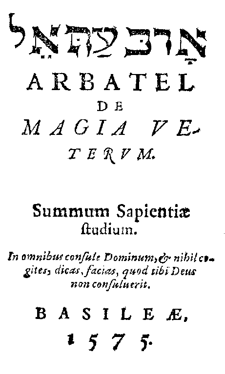 Buchtitel original